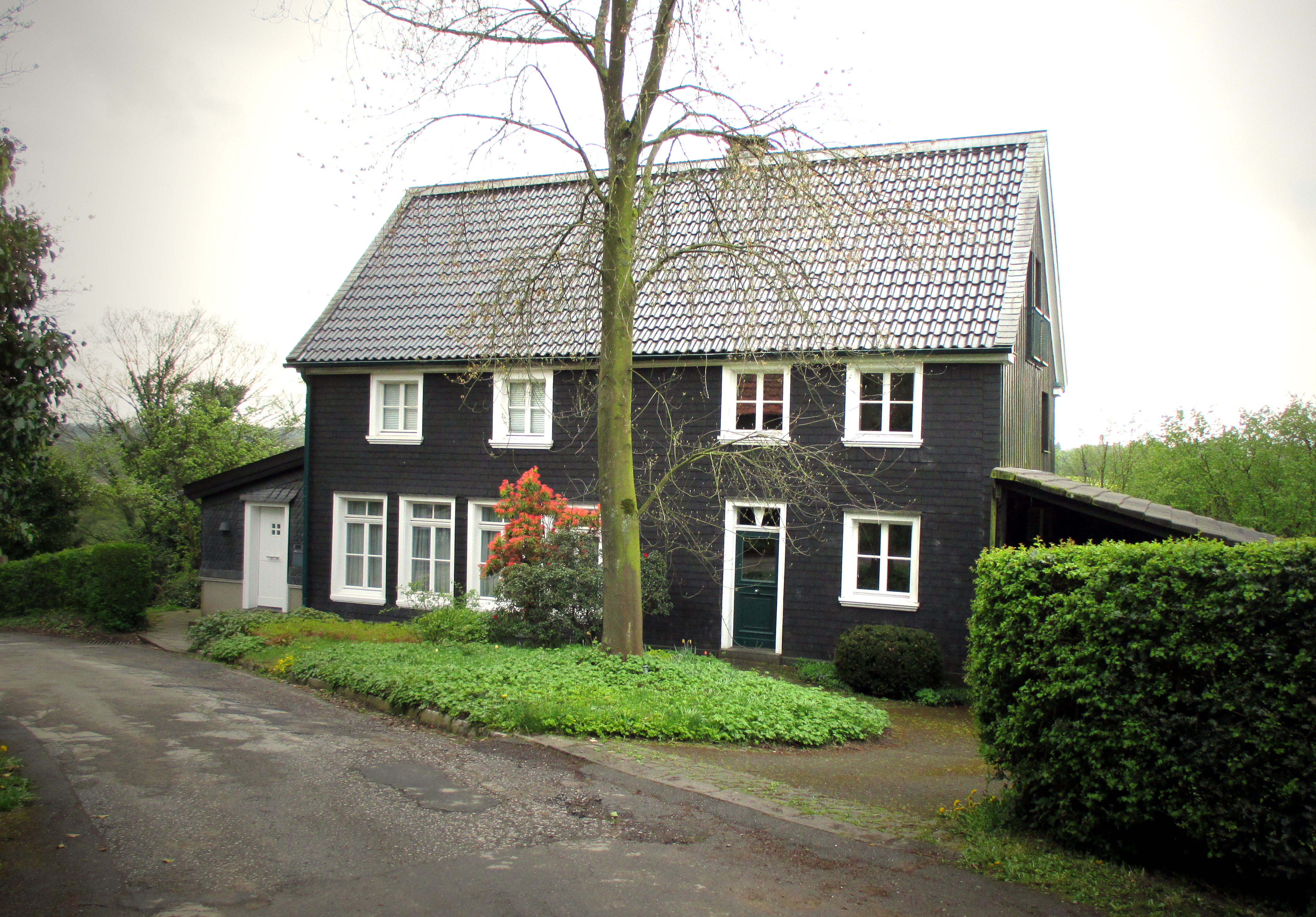 Velbert Richrath Landschule